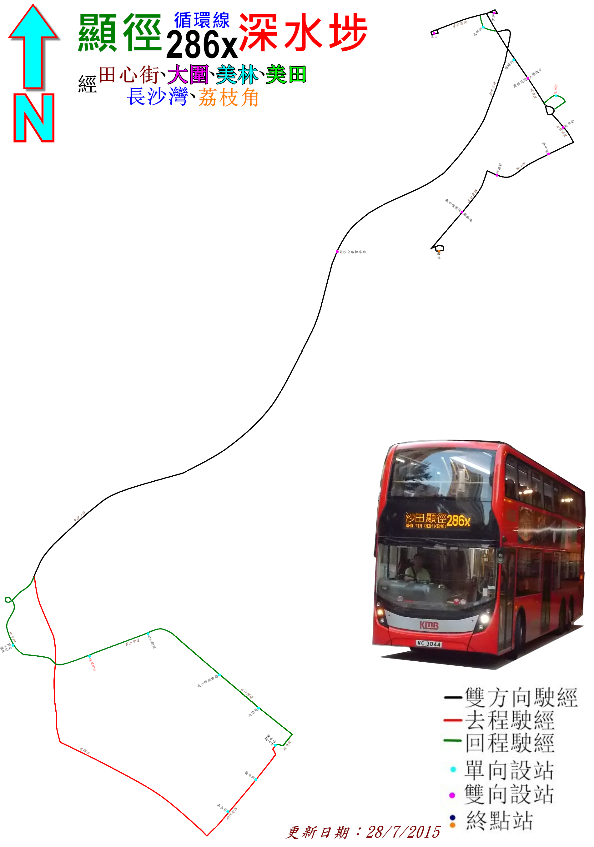 中文（香港）: 九巴286X線的走線圖